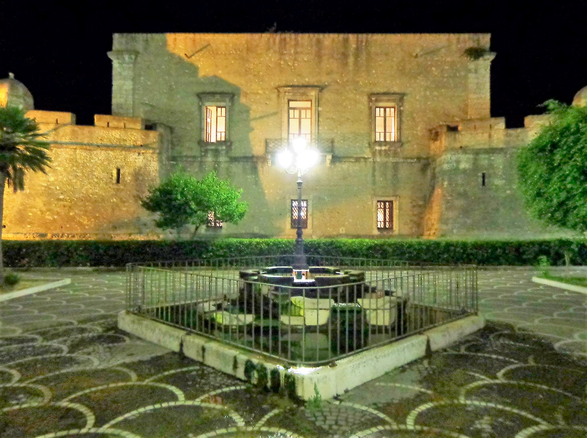 Castello Spadafora, esterno, Notte Bianca 28 07 2013, scatto già presente sulla pagina personale FB